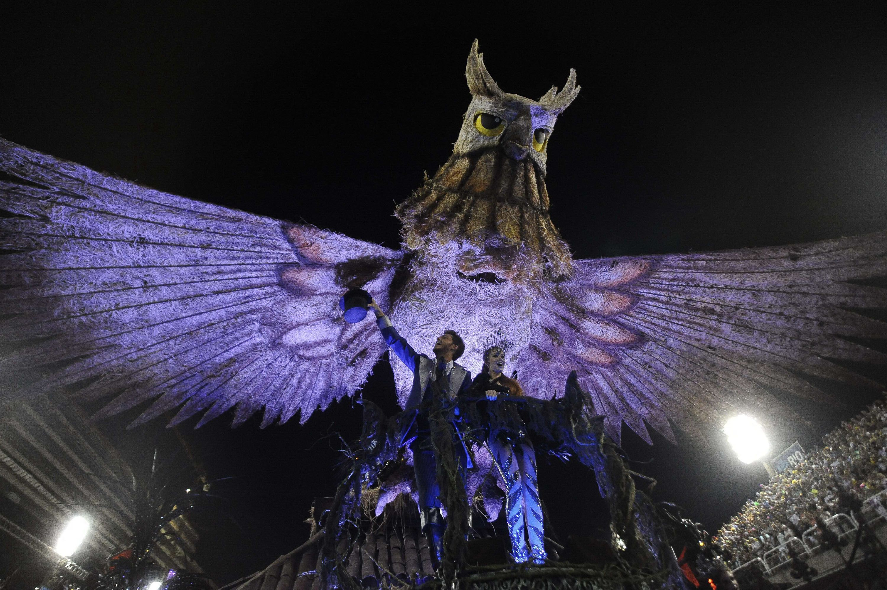 Rio de Janeiro - Escolas de samba do Grupo Especial se apresentam no Sambódromo da Marquês de Sapucaí, no primeiro dia de desfiles (Fernando Frazão/Agência Brasil)